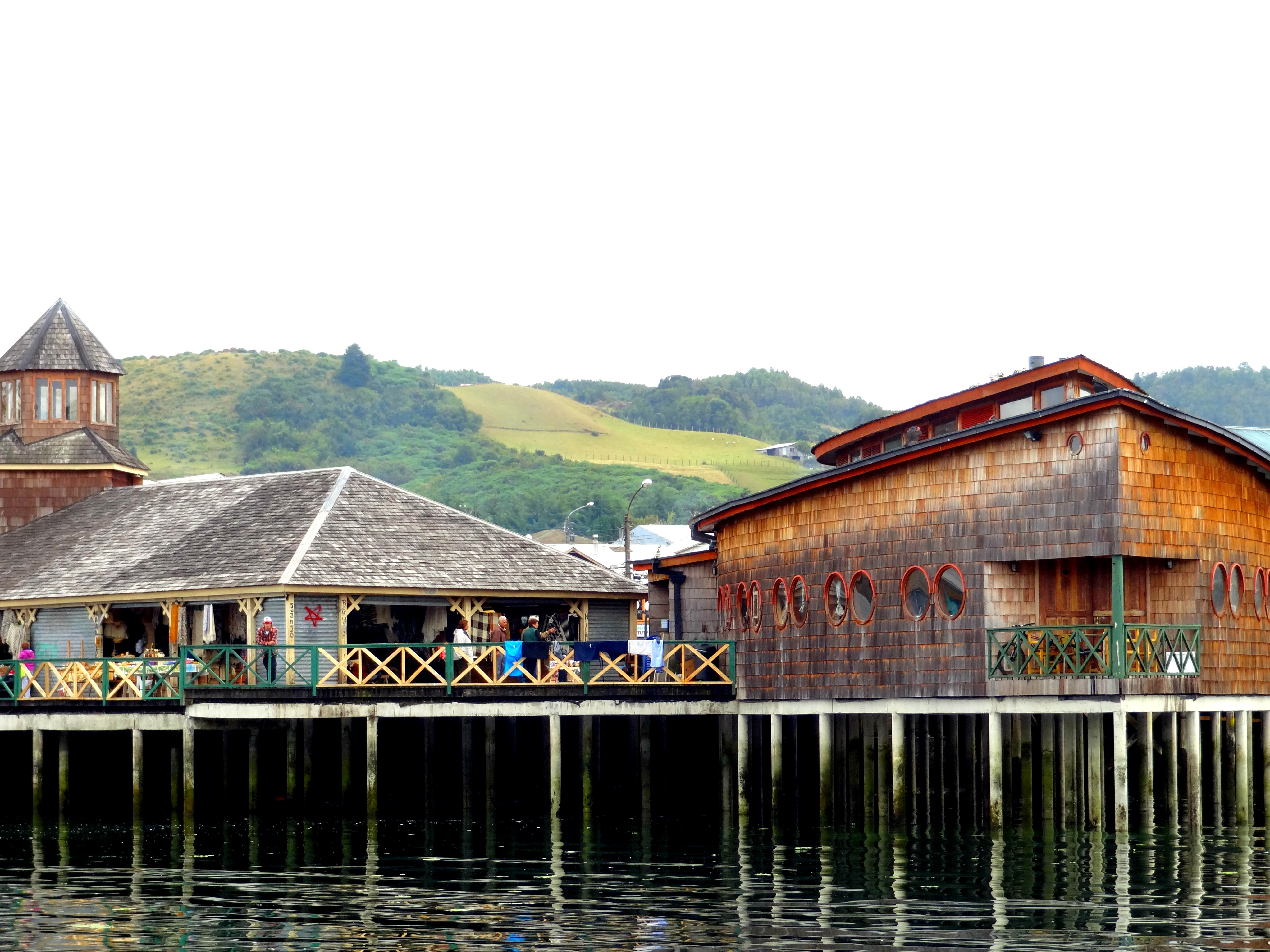 Lugares historicos de una ciudad de Chiloé, linda ropa y rica comida.